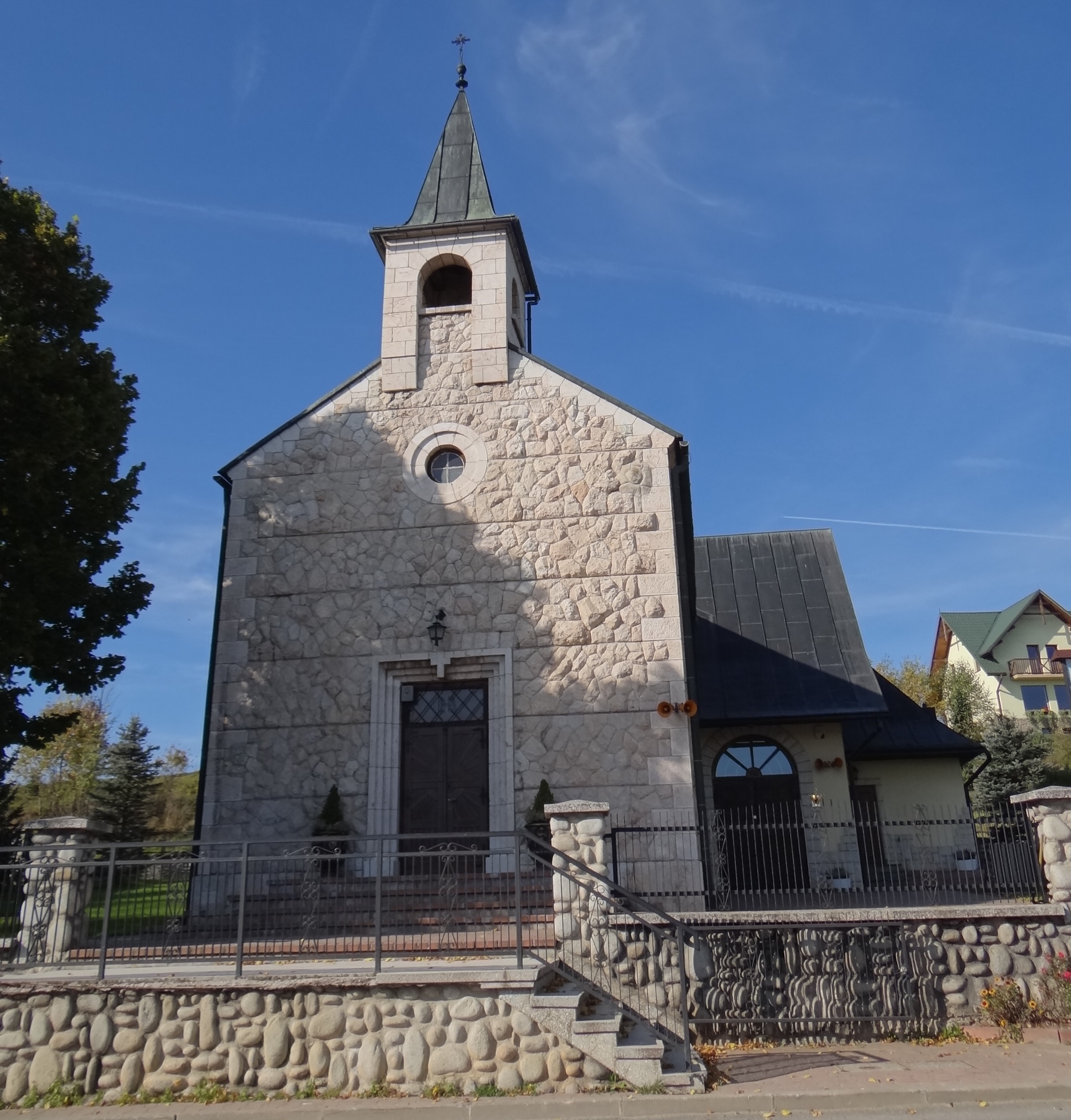 Kościół w miejscowości Załuczne